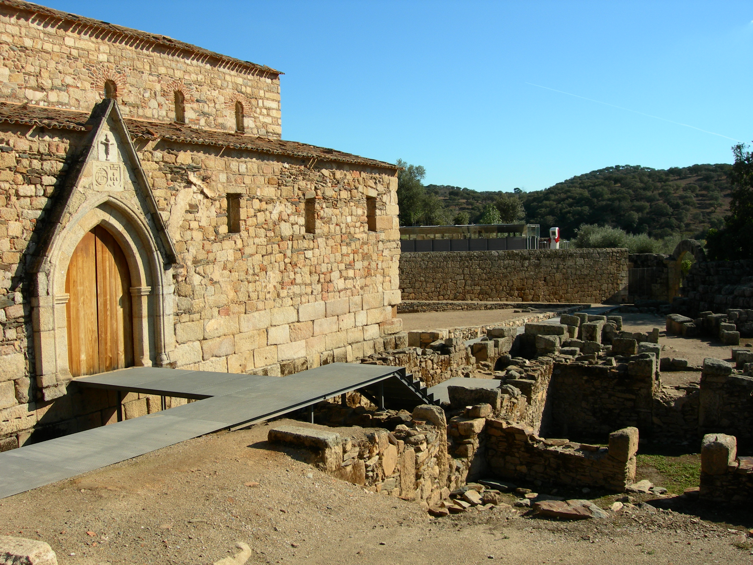 Igreja de Santa Maria This monument is classified as Monumento Nacional. This file was uploaded for Wiki Loves Monuments in Portugal with the unique identifier 70554.